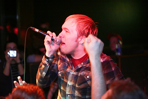 Kristopher Roe lors d'un spectacle à Sainte-Marie, Québec